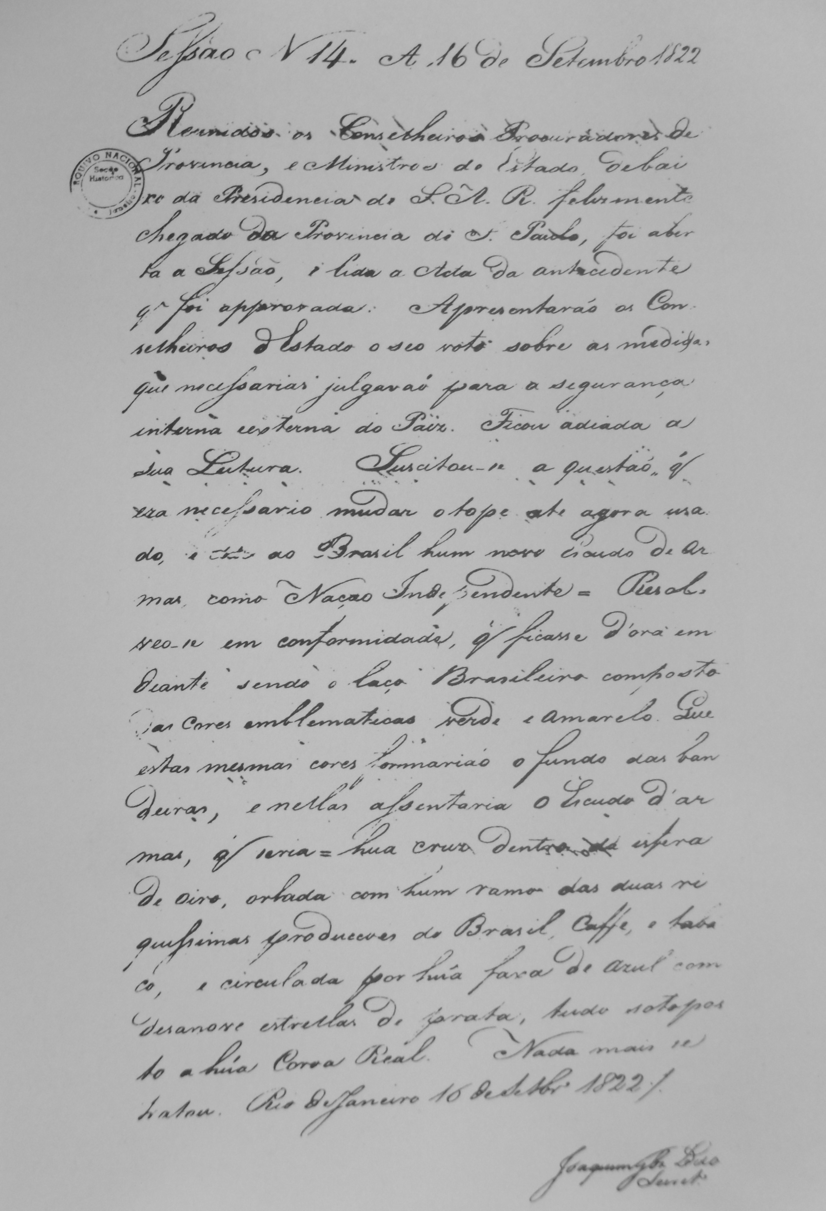 Ata do Conselho de Estado do Brasil, que discutiu a criação do Brasão de Armas nacional do Brasil, em 1822 com a assinatura de Joaquim Gonçalves Ledo